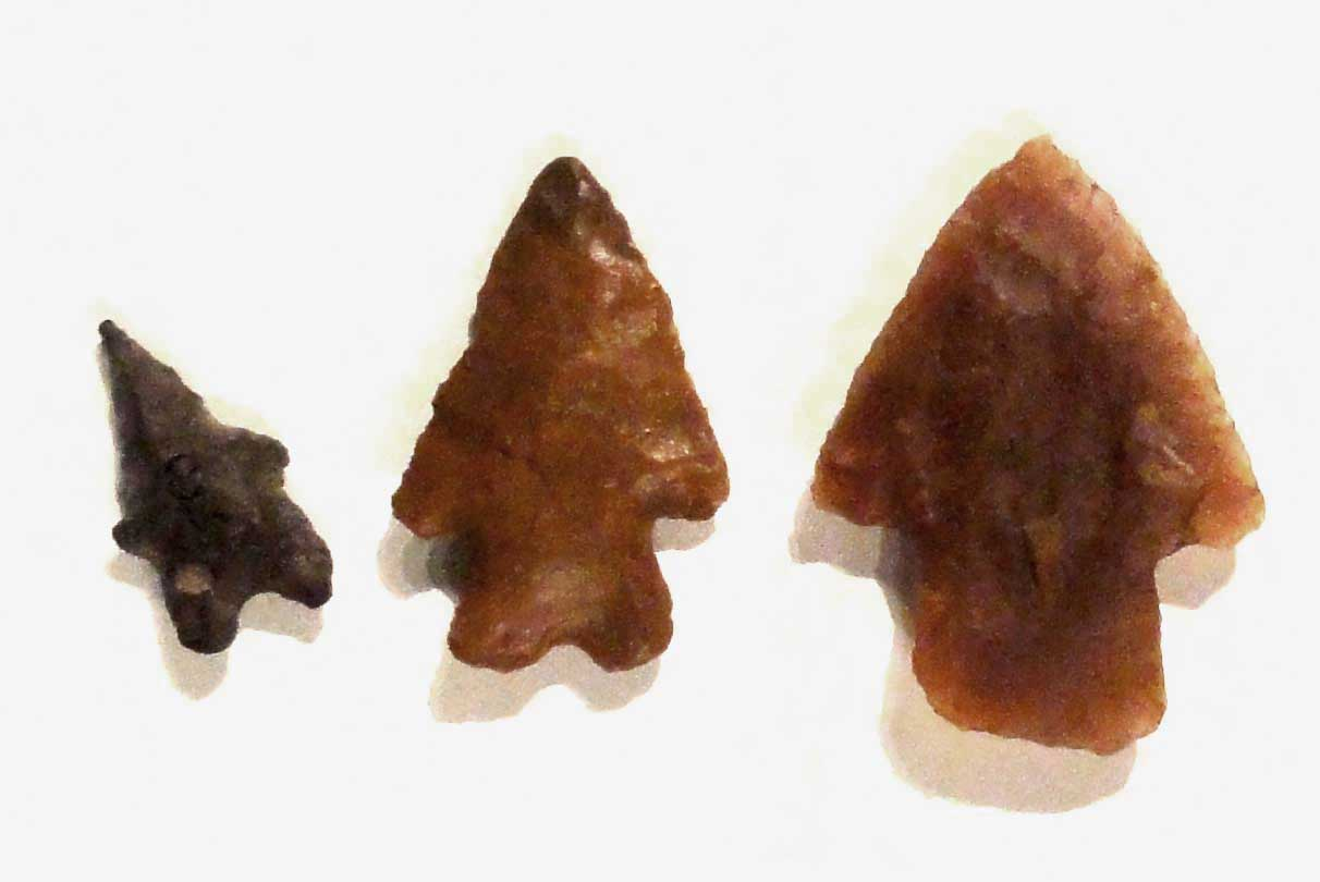 Pontas de projétil em pedra lascada, tradição Umbu